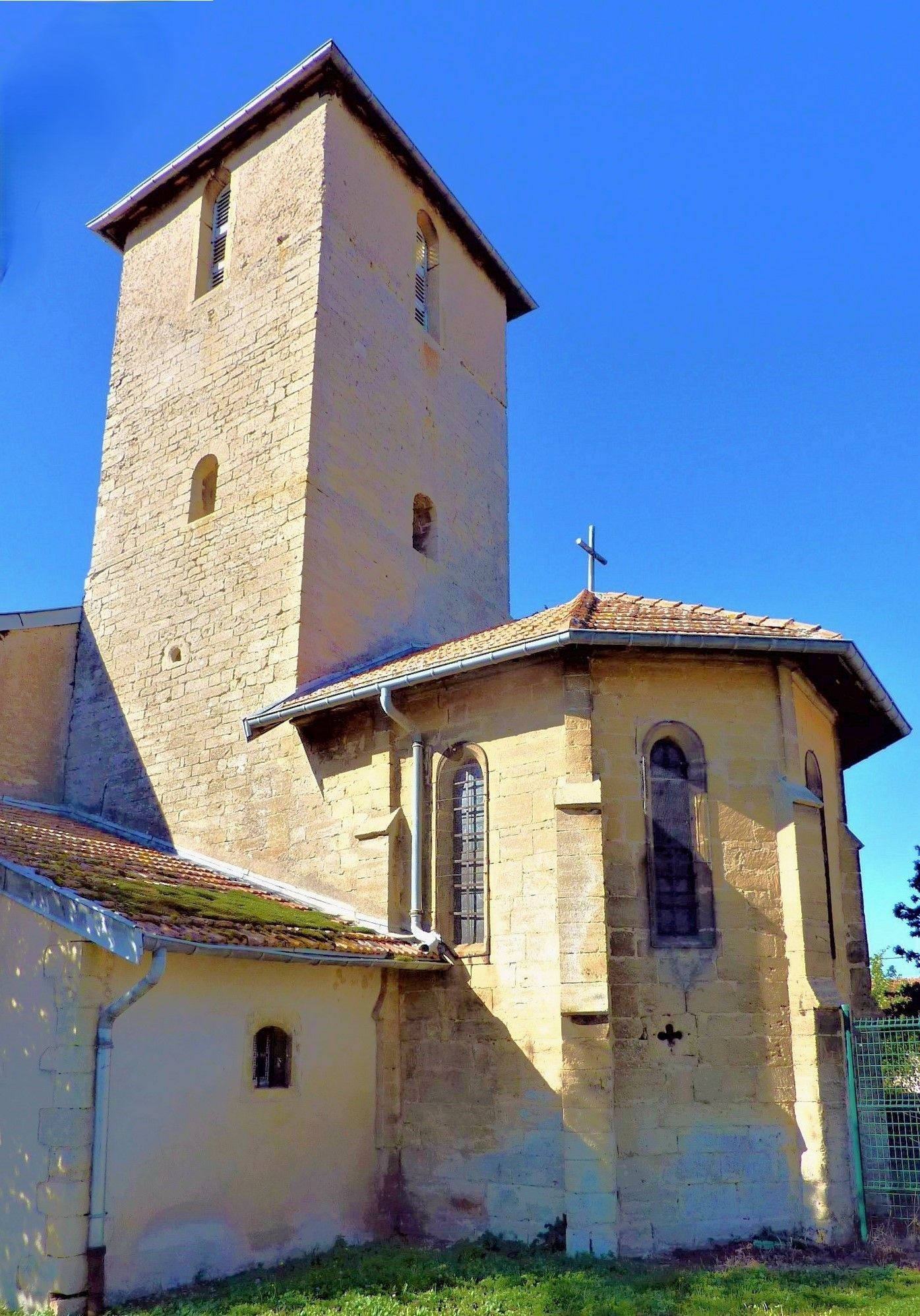 Église St-Epvre de Tronville